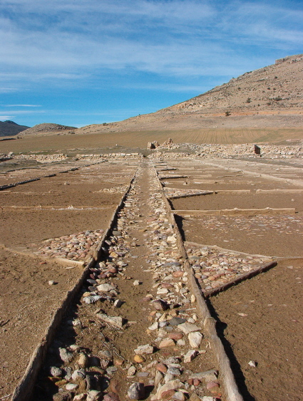 Fotografía Comarca del Jiloca